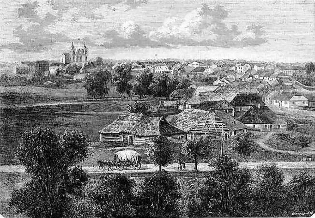 Widok ogólny Krasnegostawu od strony Zamościa